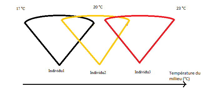 Adaptation possible à des variances de température dans l'environnement grâce à la plasticité phénotype de 3 individus d'une même espèce.